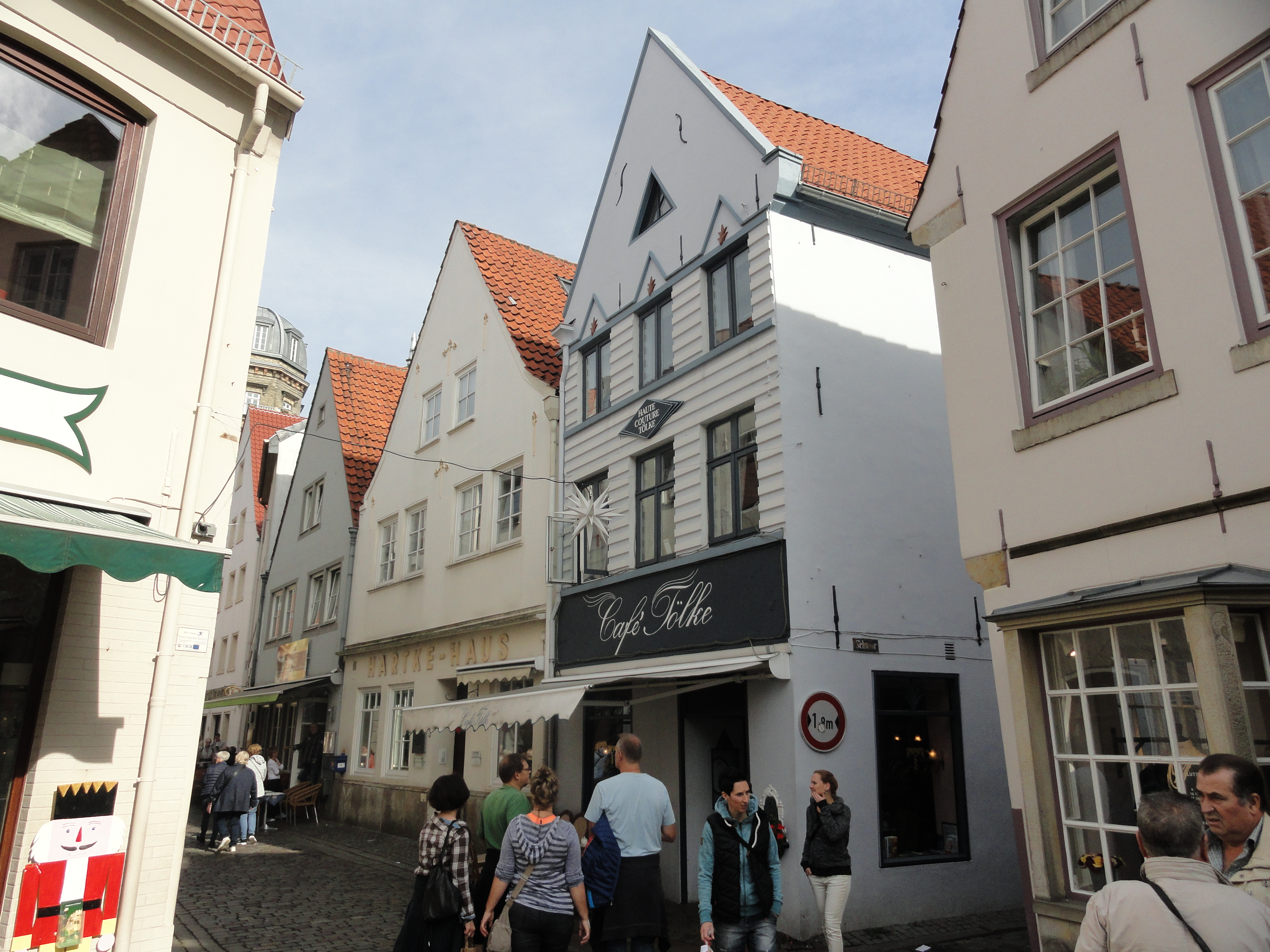 Bremen, Am Landherrnamt 3 (Hartkehaus) und 1 (Café Tölke)